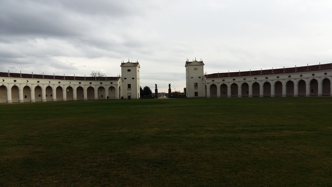 Esedre di Villa Manin dopo il restauro